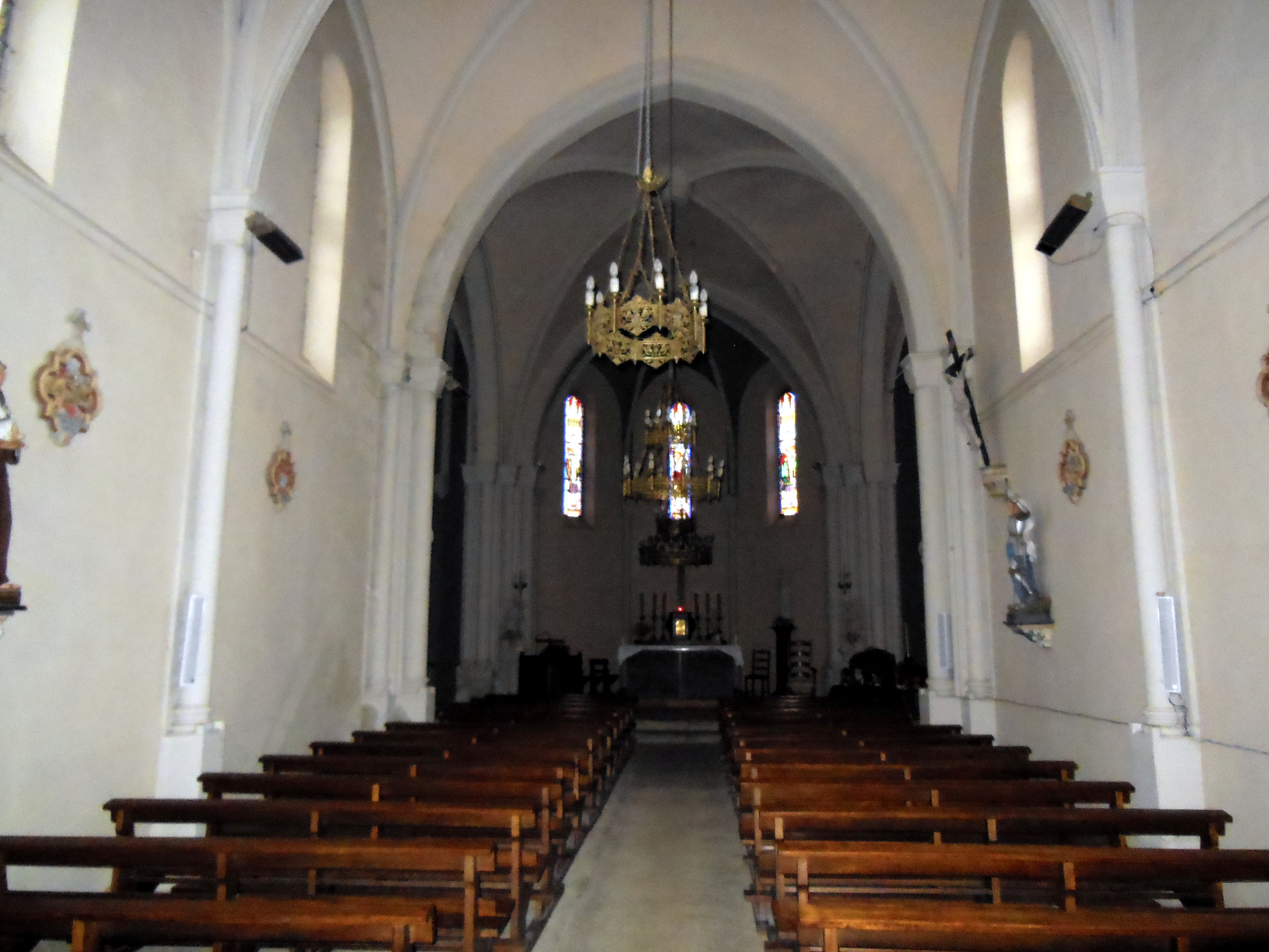 Église Saint-Loup de Lacrabe (Landes, France)